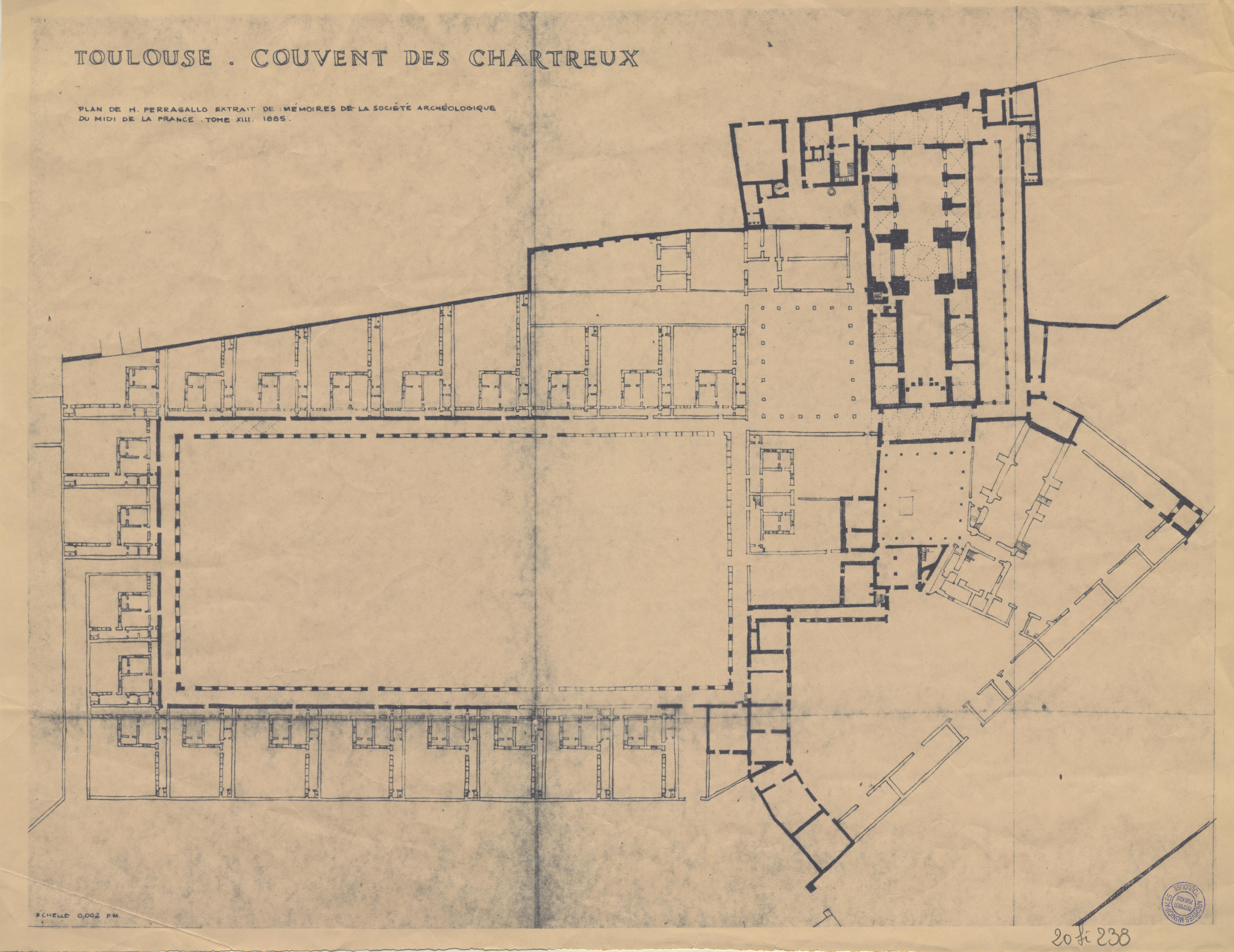 Ancien Couvent de Chartreux, puis Arsenal, actuellement Église Saint-Pierre-des-Chartreux, 21 rue Valade.1885.Plan de l'ancien couvent des Chartreux signé H. Perragallo extrait de "Mémoires de la Société Archéologique du Midi de la France", tome XIII. 1885.